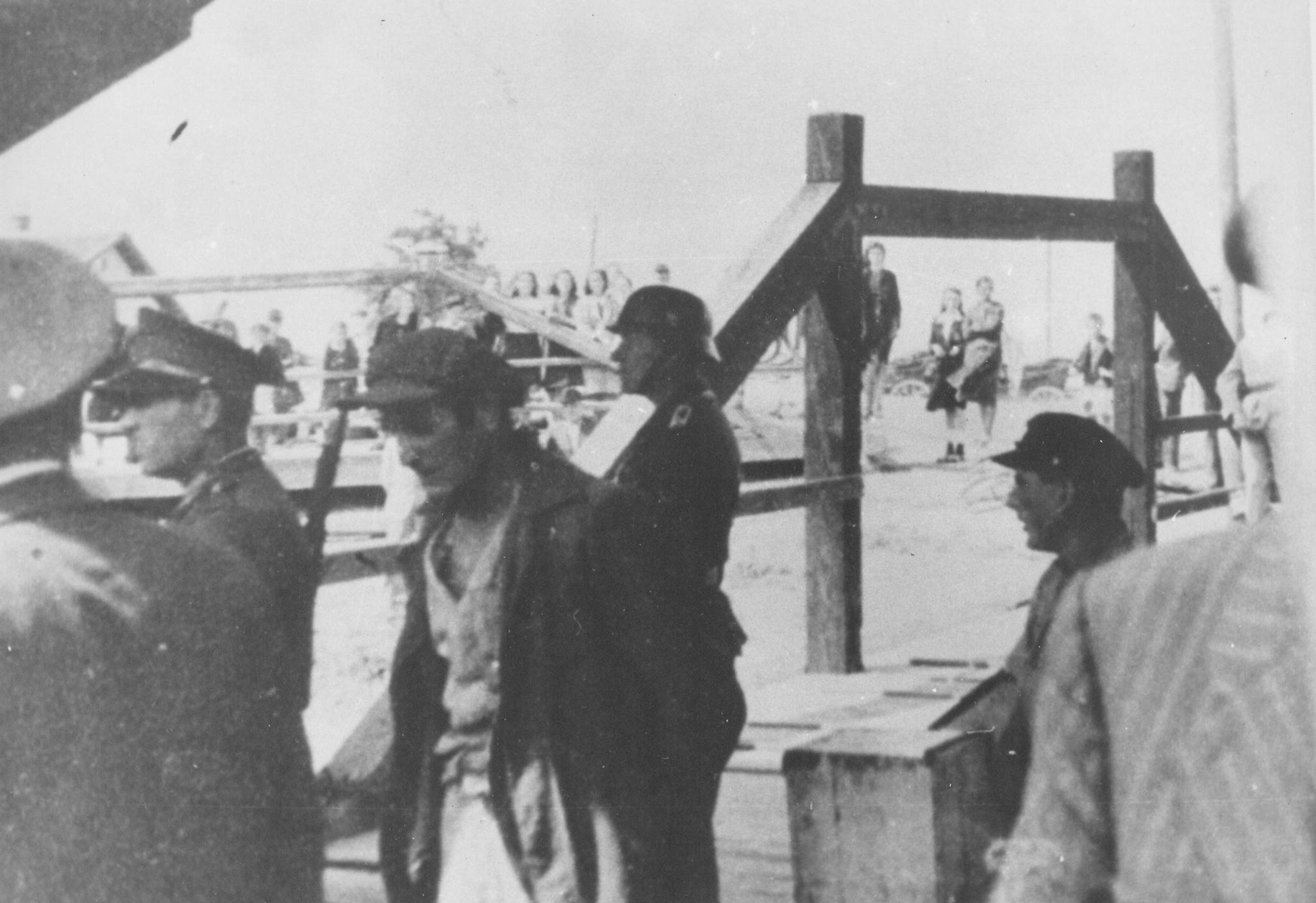 Srpskohrvatski / српскохрватски: Sprovođenje omladinaca iz "Vaspitnog zavoda" u Smederevskoj Palanci u Banjički logor. (inv. br. 9545.)